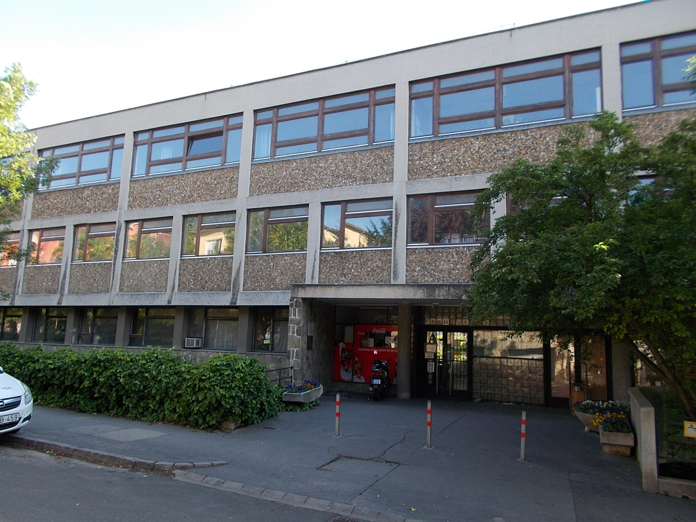 Budapesti Corvinus Egyetem (volt Kertészeti Egyetem). Kertészeti- Élelmiszeripari- Tájépítészeti- Kar épülete. 'A' épület. Műemlék ID 8217. Budapest, XI. kerület, Ménesi út 44